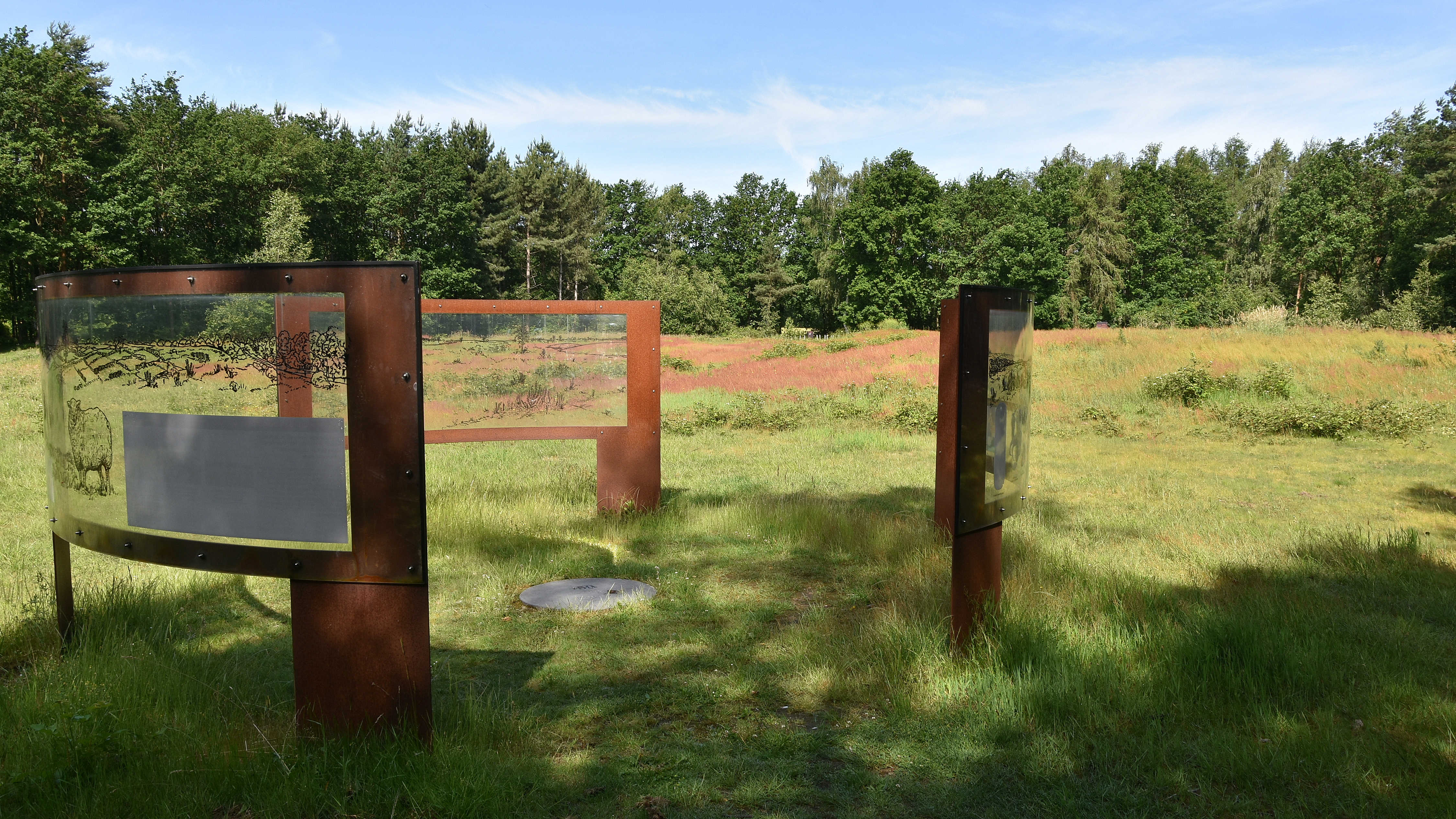 Archeologisch park de Rieten - Wijshagen 9-06-2019 10-56-04